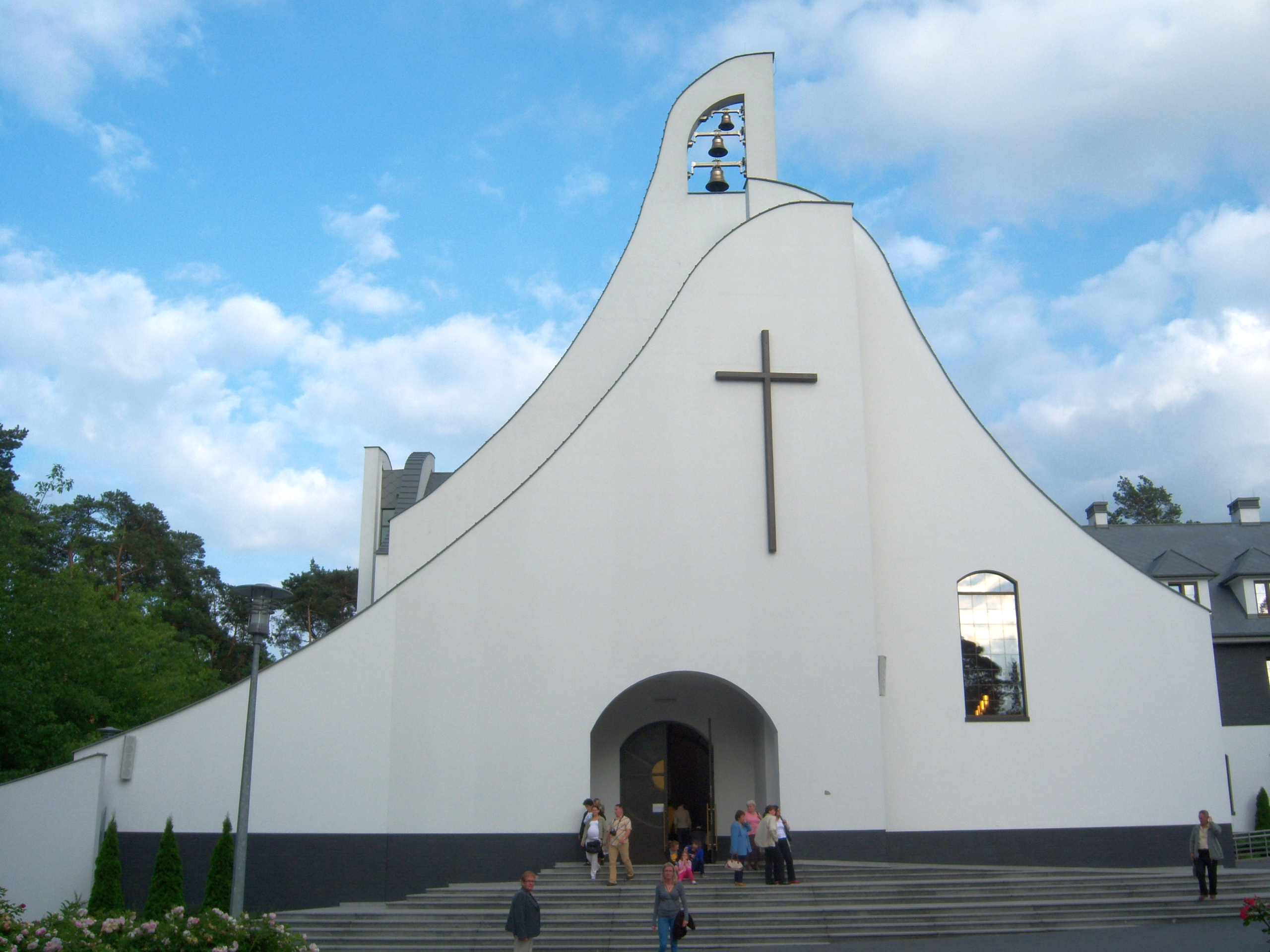 Kościół Matki Bożej Dziesięciu Cnót Ewangelicznych w Lesie Grąblińskim